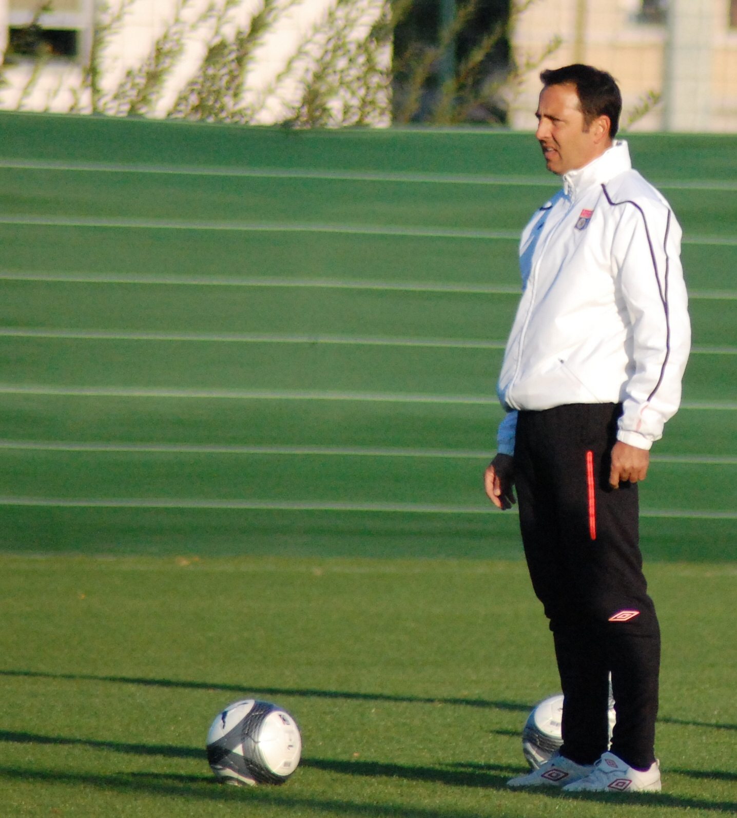 Patrick Collot